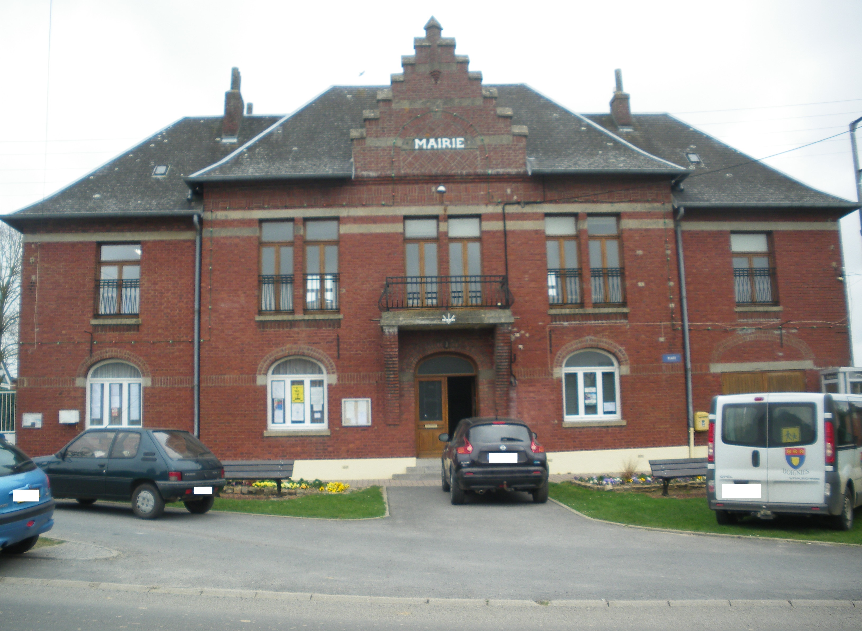 Vue de la mairie de Doignies.